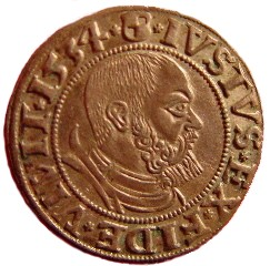 Albrecht von Brandenburg Preußen Groschen, 1534 Vorderseite: Albrecht, IVSTVS.EX.FIDE.VIVIT.1534 Rückseite: Adler, ALBER.D.G.MAR.BRAN.DVX.PRVSS